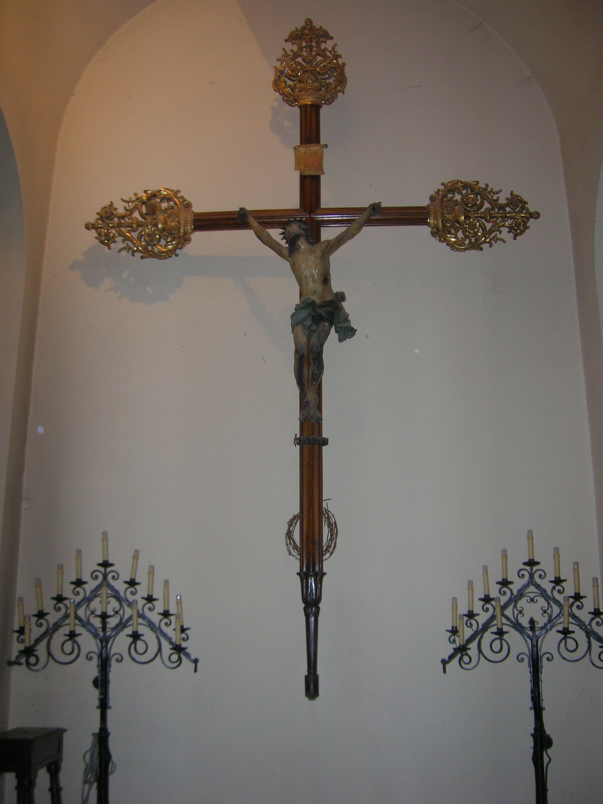 La Spezia - Chiesa di N.S. della Salute - Crocifisso ligneo